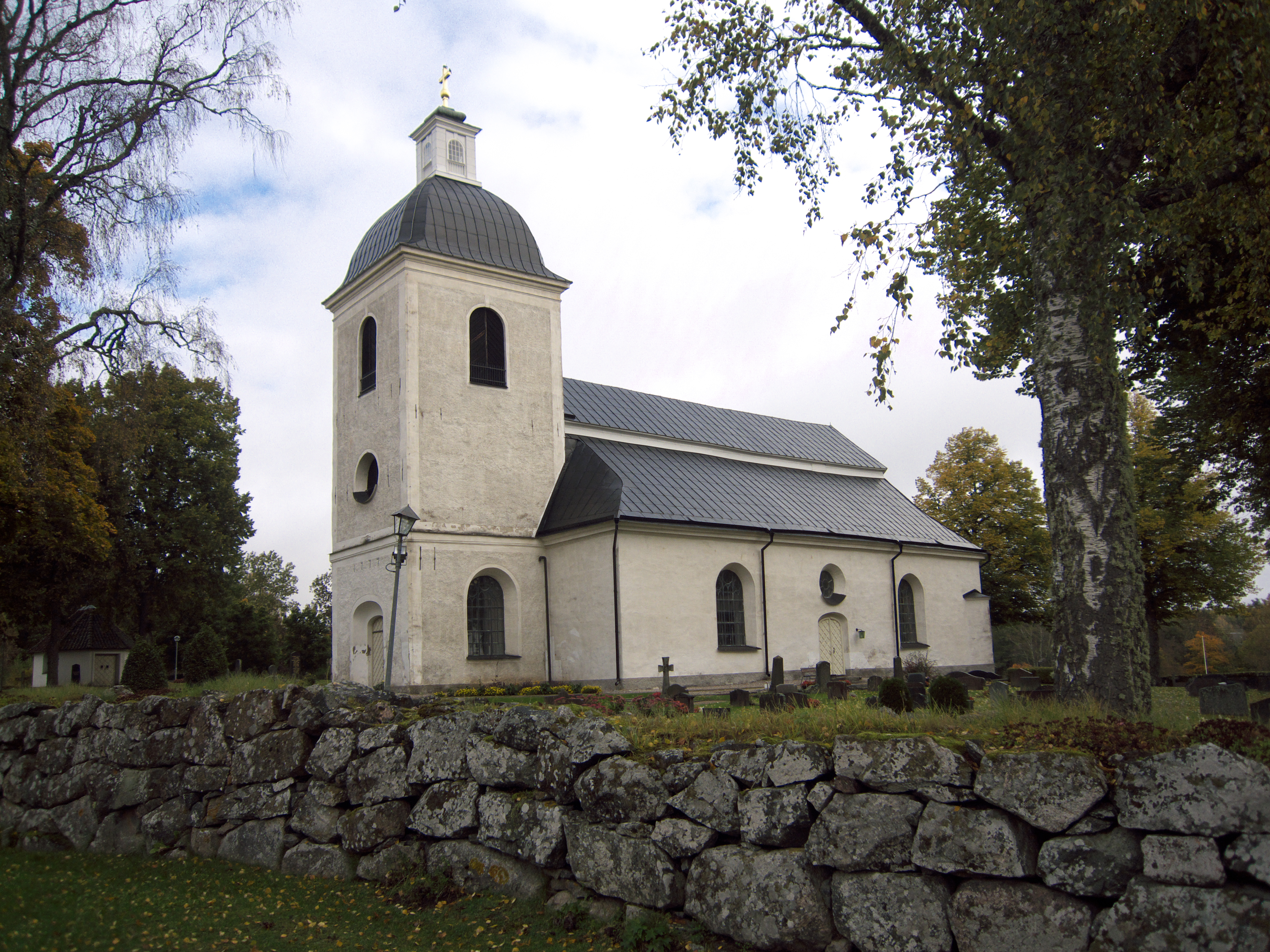 Odensvi kyrka, Västerås stift